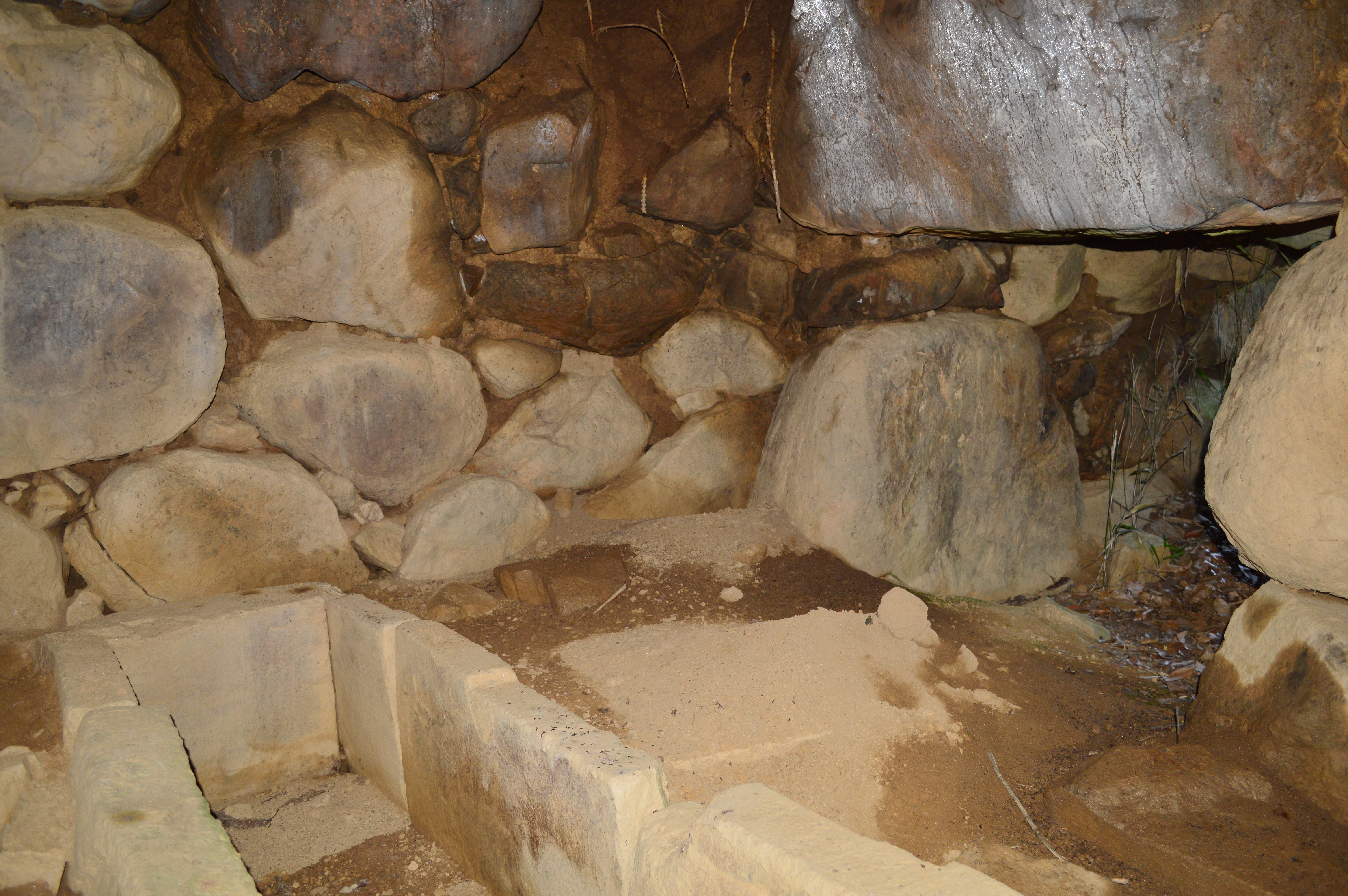 谷脇古墳 石室玄室